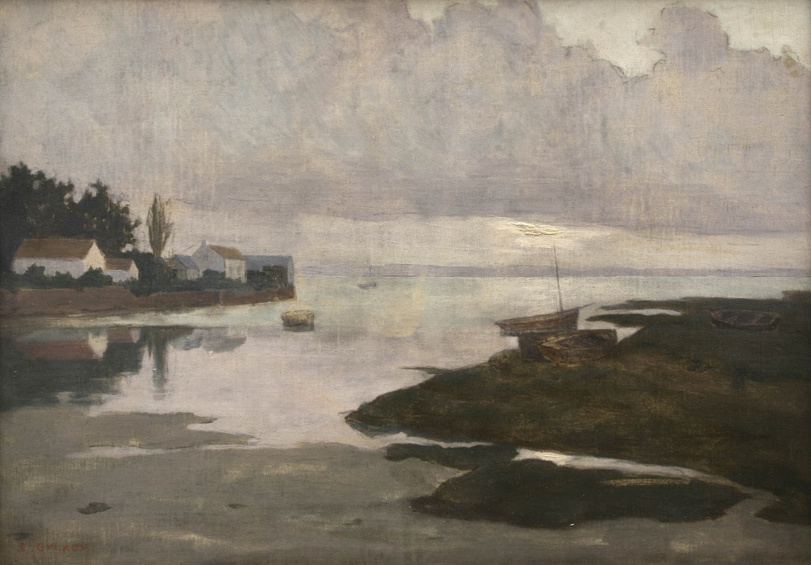 Paysage